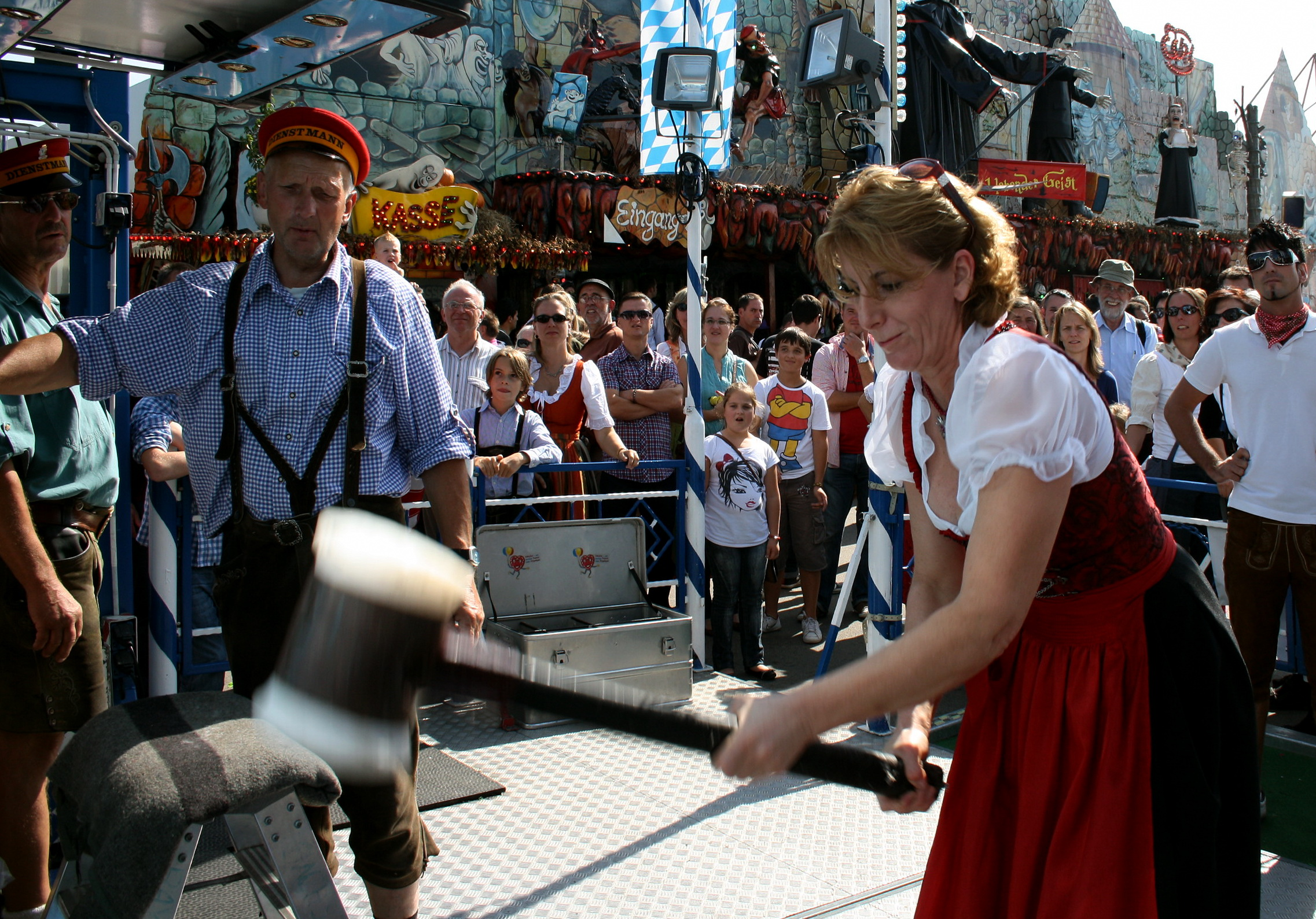 Oktoberfest 2011 - Schlag den Lukas